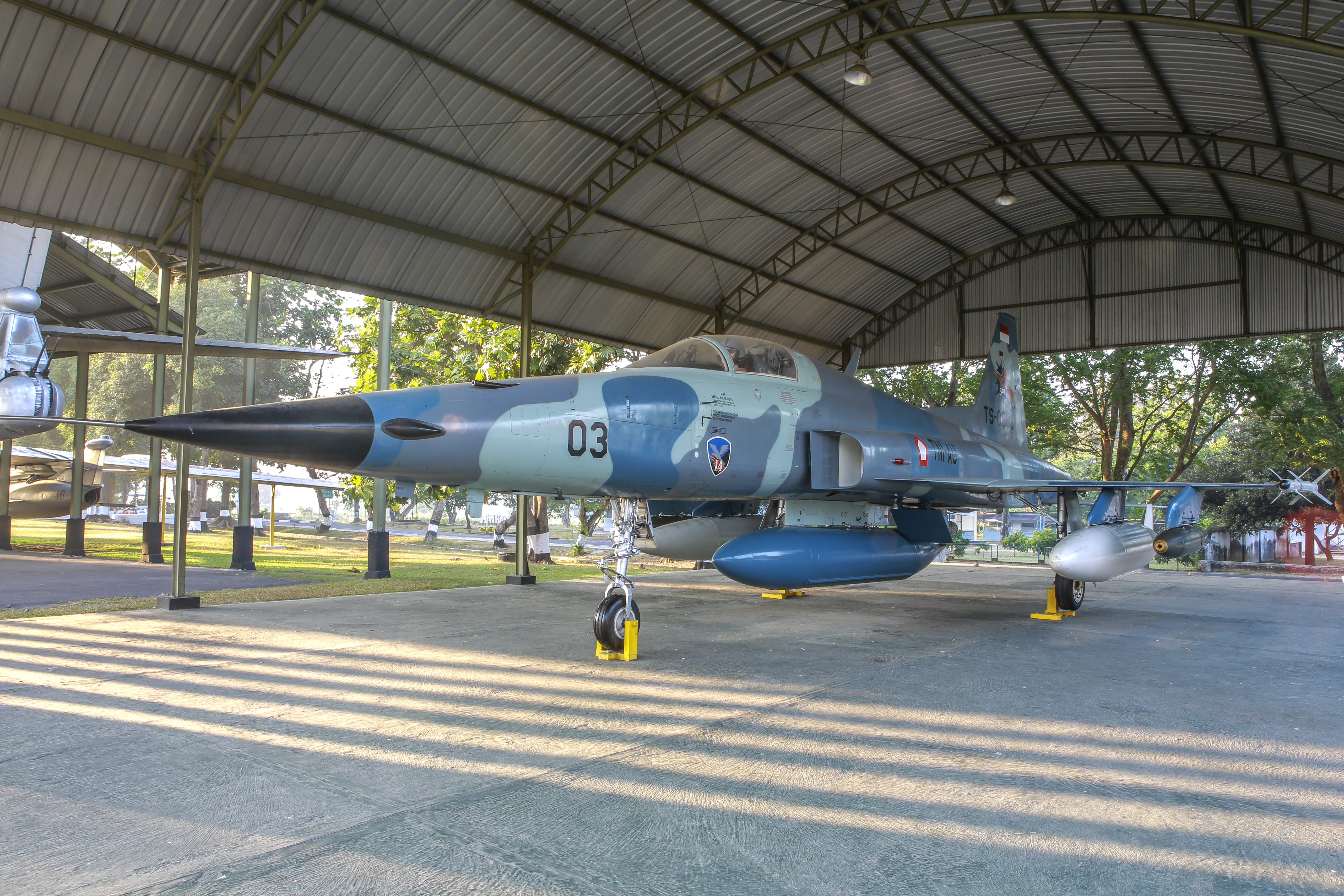 Pesawat F-5E-F-Tiger II, TNI AU